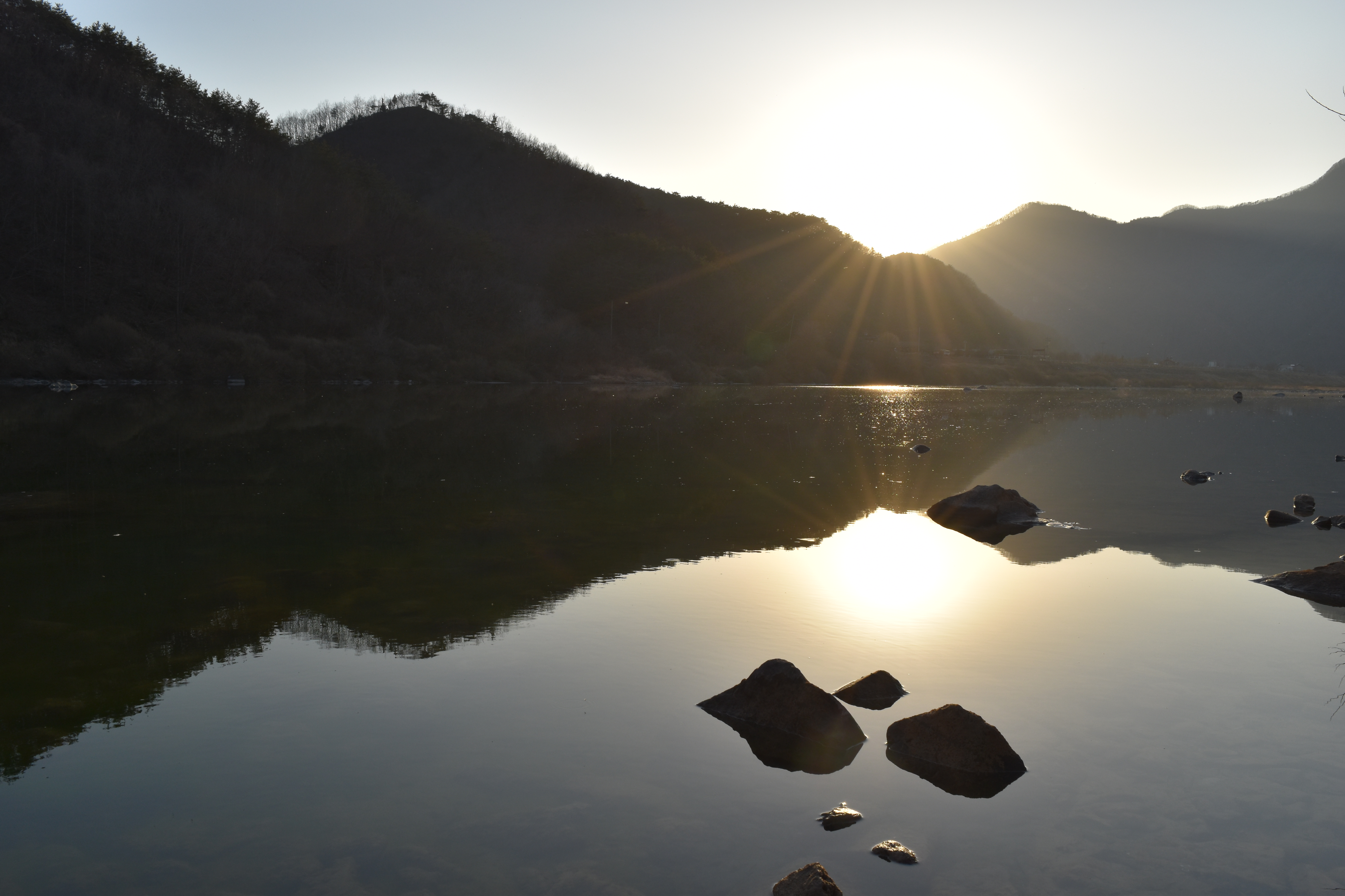 영월 인근을 지나는 동강